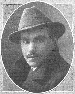 Fotografía del pintor y poeta español Gabriel García Maroto publicada en 1913 con motivo de la reciente publicación de su libro La caravana pasa...